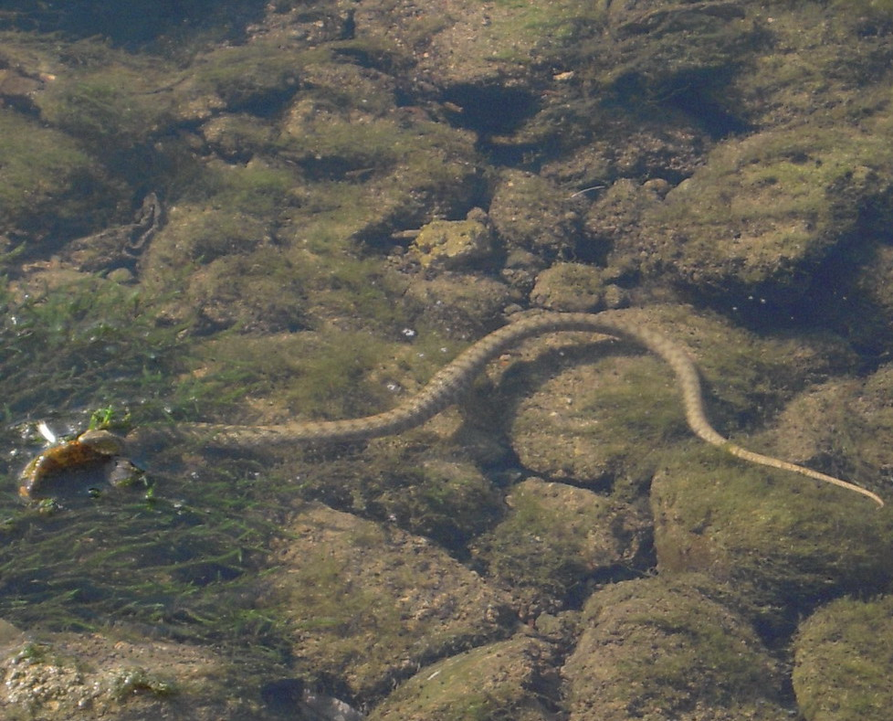 Zmija_jede_ribu_(Vrbas)